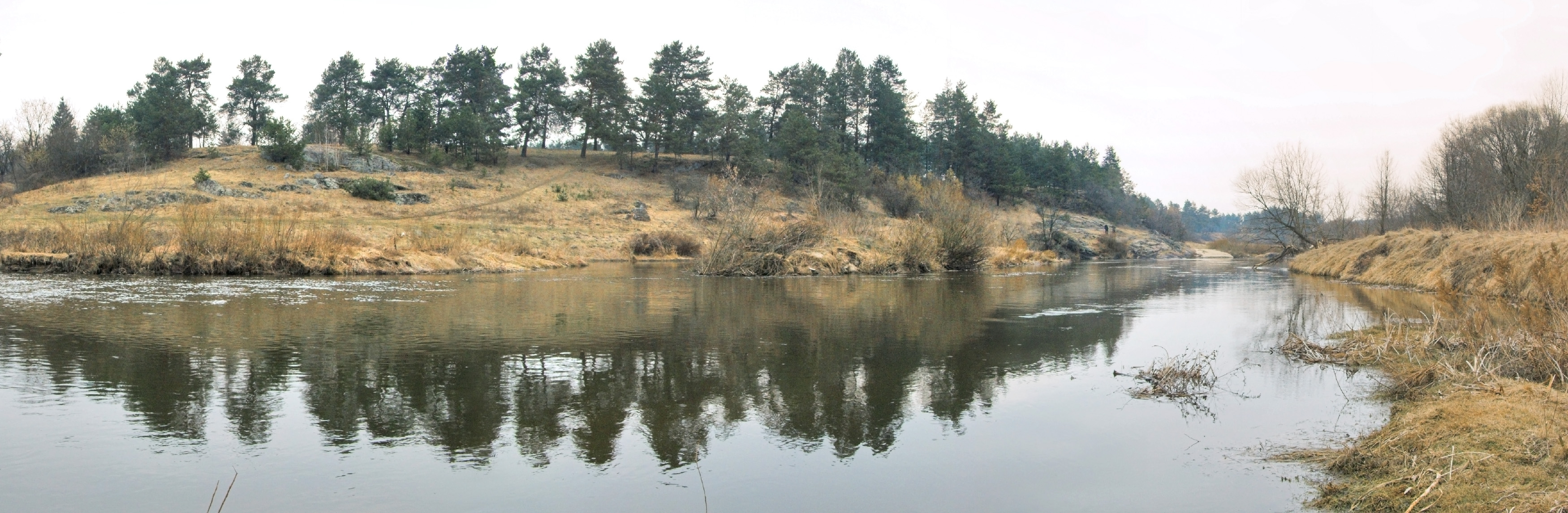 Відслонення пегматиту, Коростишівський район, с. Високий Камінь, заплава лівого берега р. Тетерів